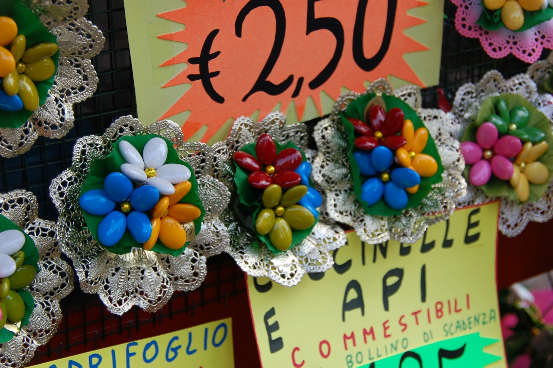 Sulmona 2011